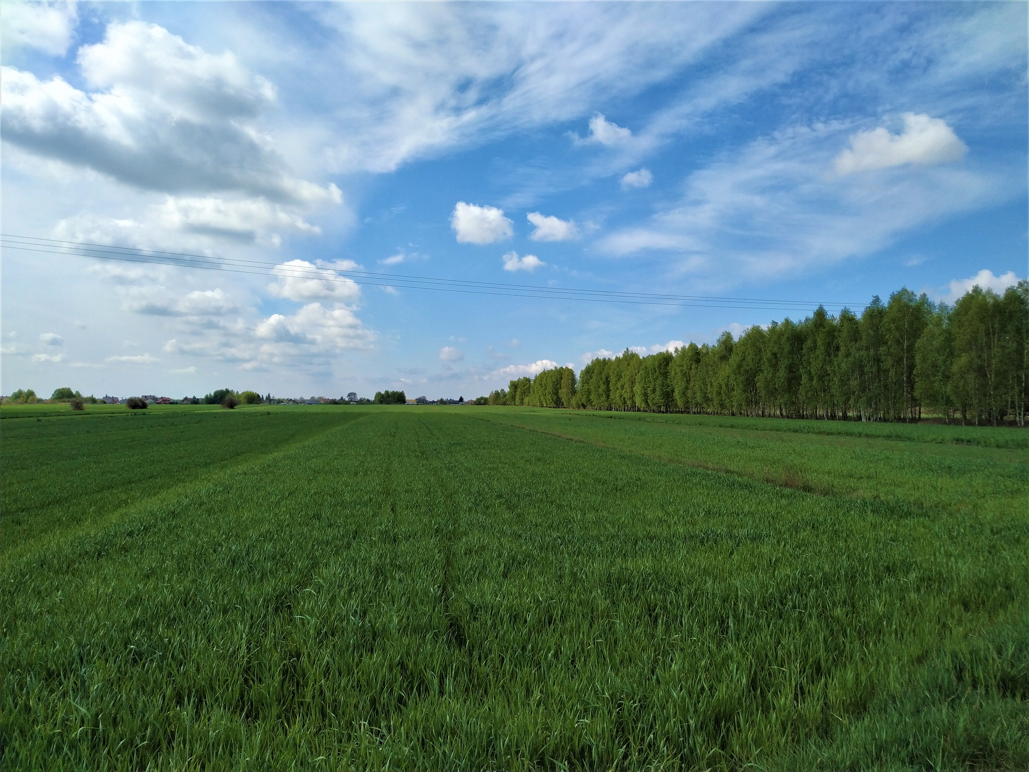 Krajobraz łąk i pól w granicach miasta Łuków